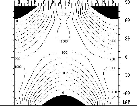 El gráfico muestra la radiación solar incidente en el supuesto de ausencia de atmósfera, sobre la Tierra en función de la latitud y de la fecha. Se dibujan puntos con igual insolación diaria dada en langleys (calorias/cm2). La región oscura es la zona de insolación nula por ser noche permanente. Las curvas van de 100 en 100 langleys. Se observa que durante el verano la la insolación diaria varía poco entre los polos y el ecuador en ambos hemisferios, esto es así porque en el polo la poca inclinación de los rayos solares se ve compensado por la mayor duración del día. La gráfica muestra que en verano hay más insolación en los polos que en los trópicos. En superficie esto no es así porque los rayos muy inclinados en los polos sufren mucha absorción por la atmósfera y la nieve y las nubes de las regiones polares reflejan mucha radiación hacia el espacio. El gráfico es el resultado de un programa realizado por el autor en 1995 para intentar reproducir gráficos similares vistos en el libro Meteorología de Albert Miller y La energía radiante en la atmósfera de Emilio Caimi.